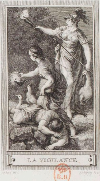 La vigilance illustration de Charles-Nicolas Cochin dans Iconologie, ou Traité de la science des allégories / ... en 350 figures gravées avec les explications relatives à chaque sujet par Gaucher.tome 4 1796.